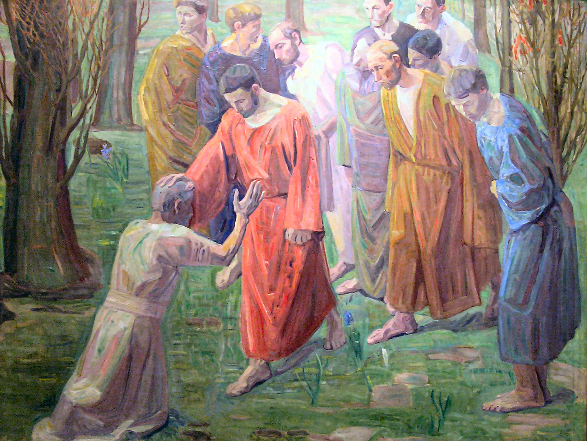 Niels Larsen Stevns: Helbredelsen af den spedalske,Healing of the Leper